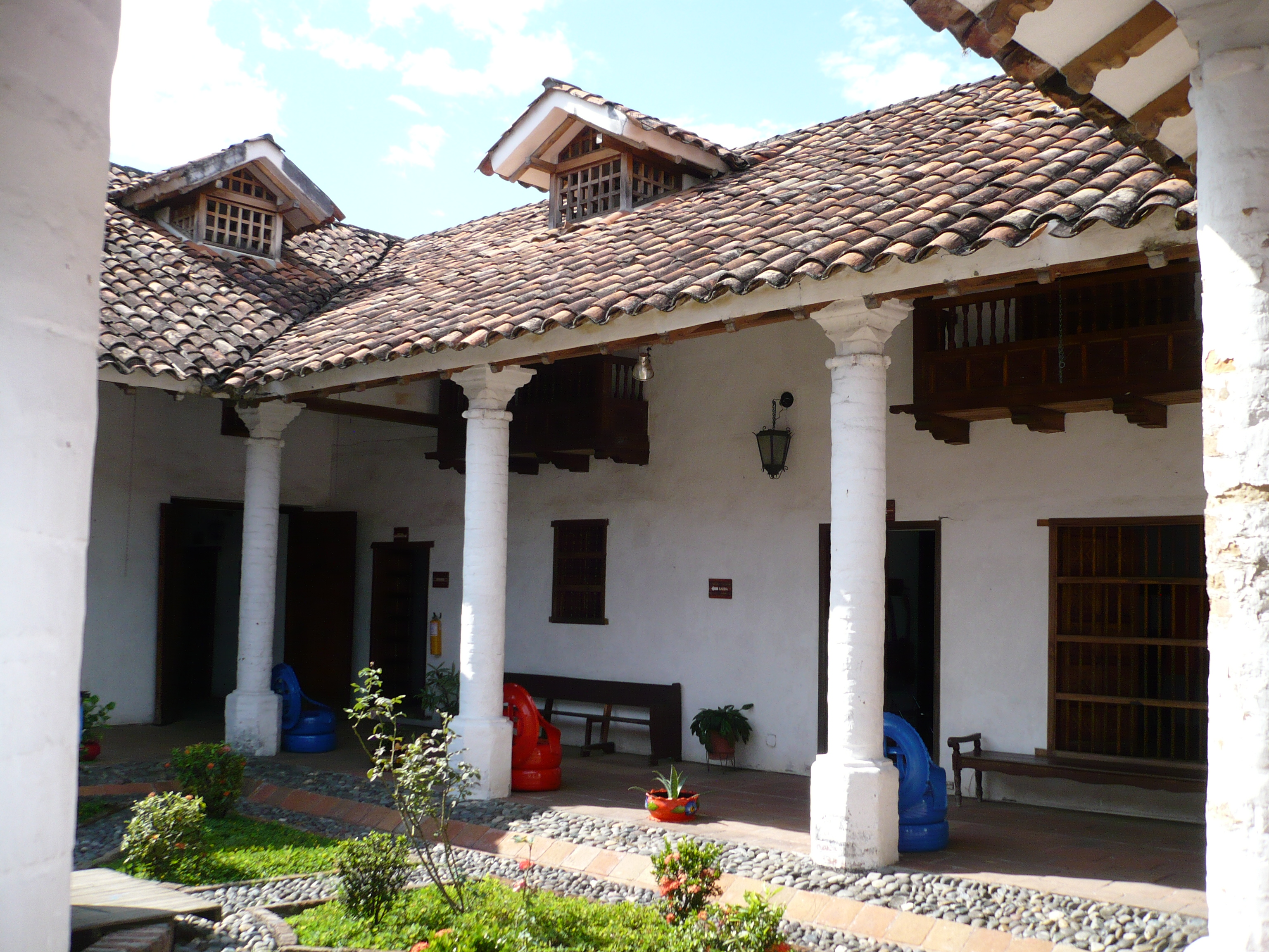 Interior en la Casa del Virrey. Cartago, Valle, Colombia.